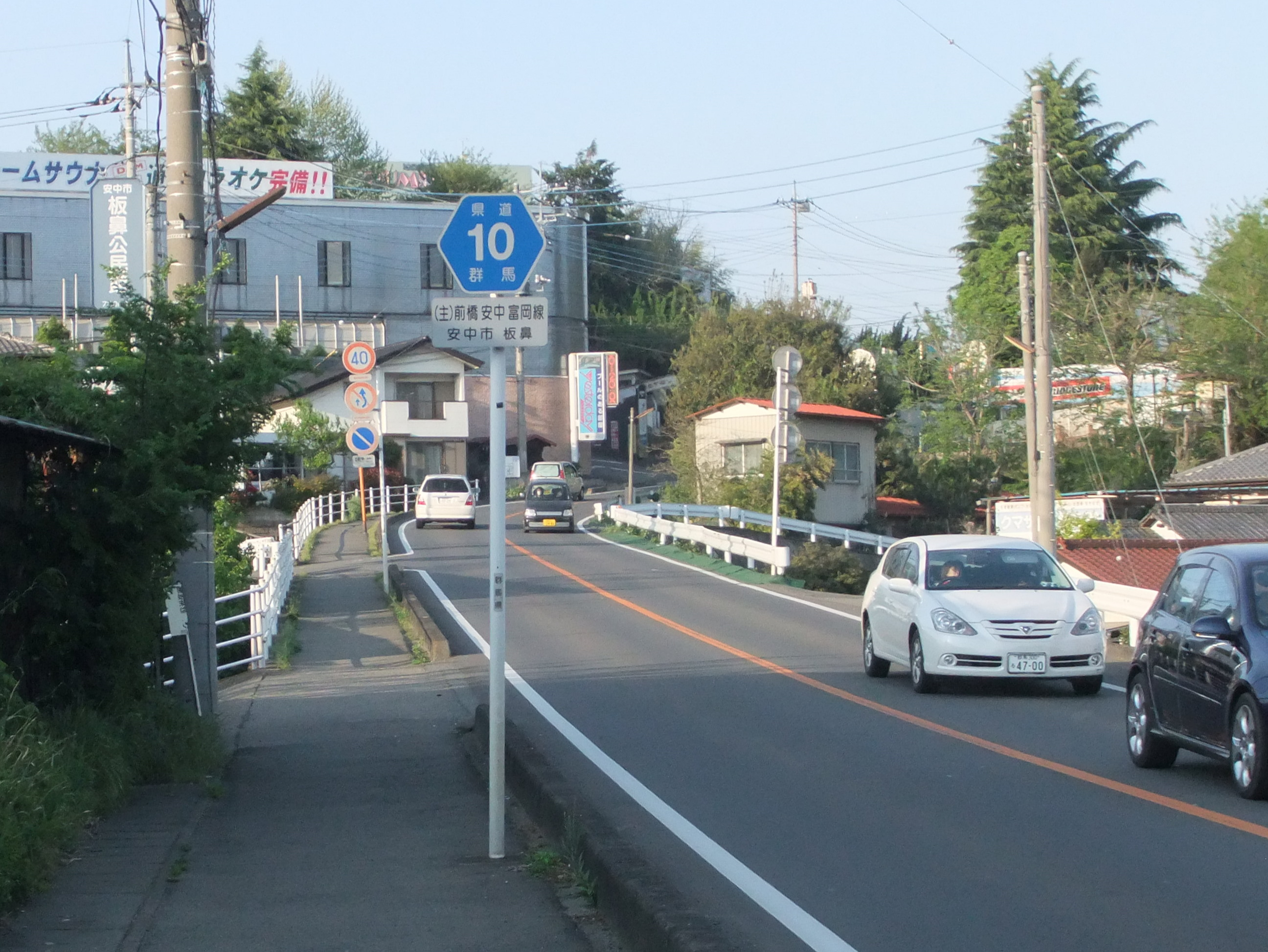 群馬県道10号の安中市板鼻付近、前橋方面に向けて撮影